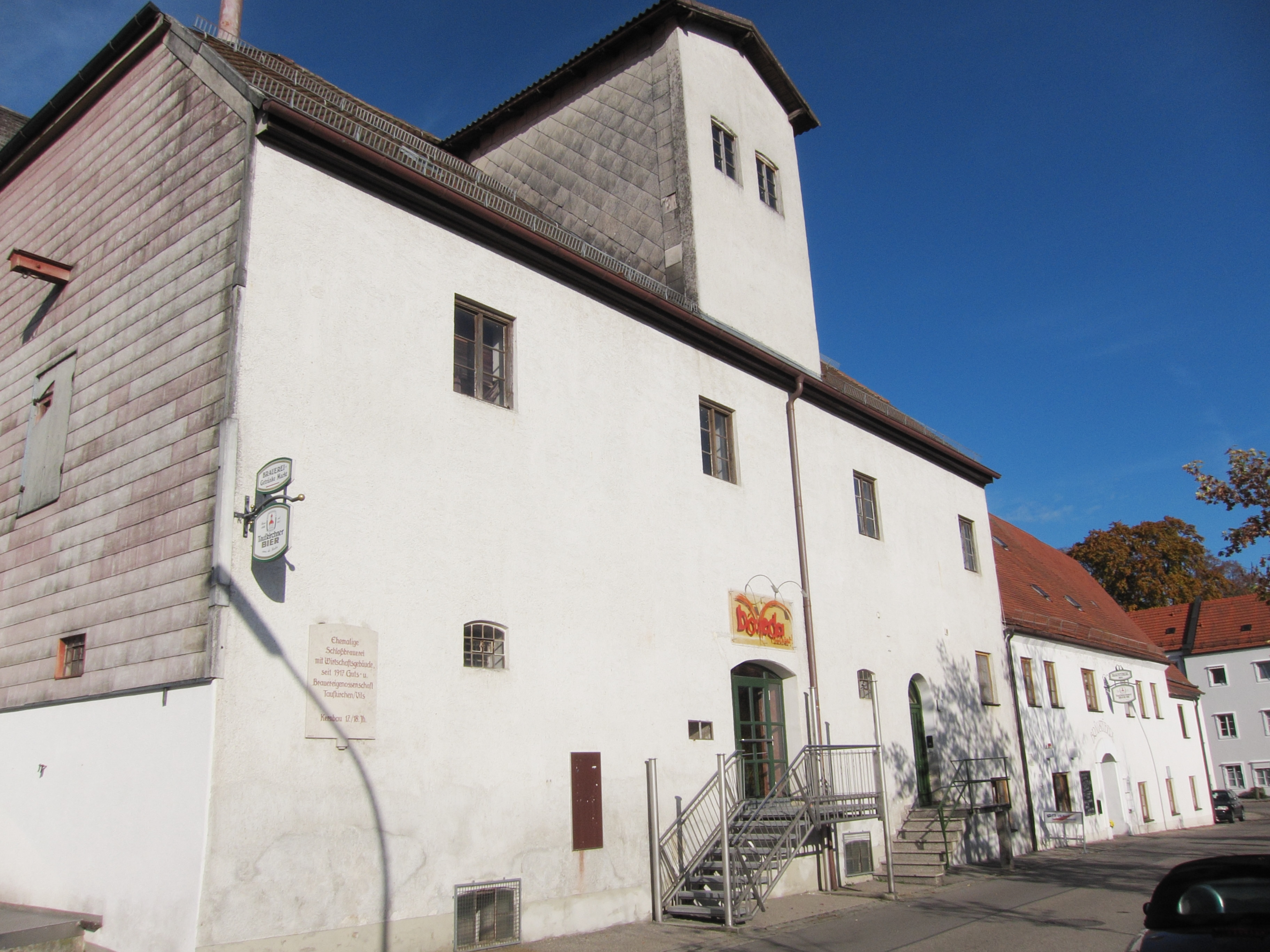 Bräuhausstraße 3; stattliches Dreiflügelgebäude mit Bräustüberl und Wohnungen (Südflügel), Sudhaus (Westflügel) und Lagerhalle (Nordflügel), meist zweigeschossiger Massivbau mit Satteldach und Halbwalm, Kernbau 17./18. Jahrhundert, sonst erstes Drittel 19. Jahrhundert.